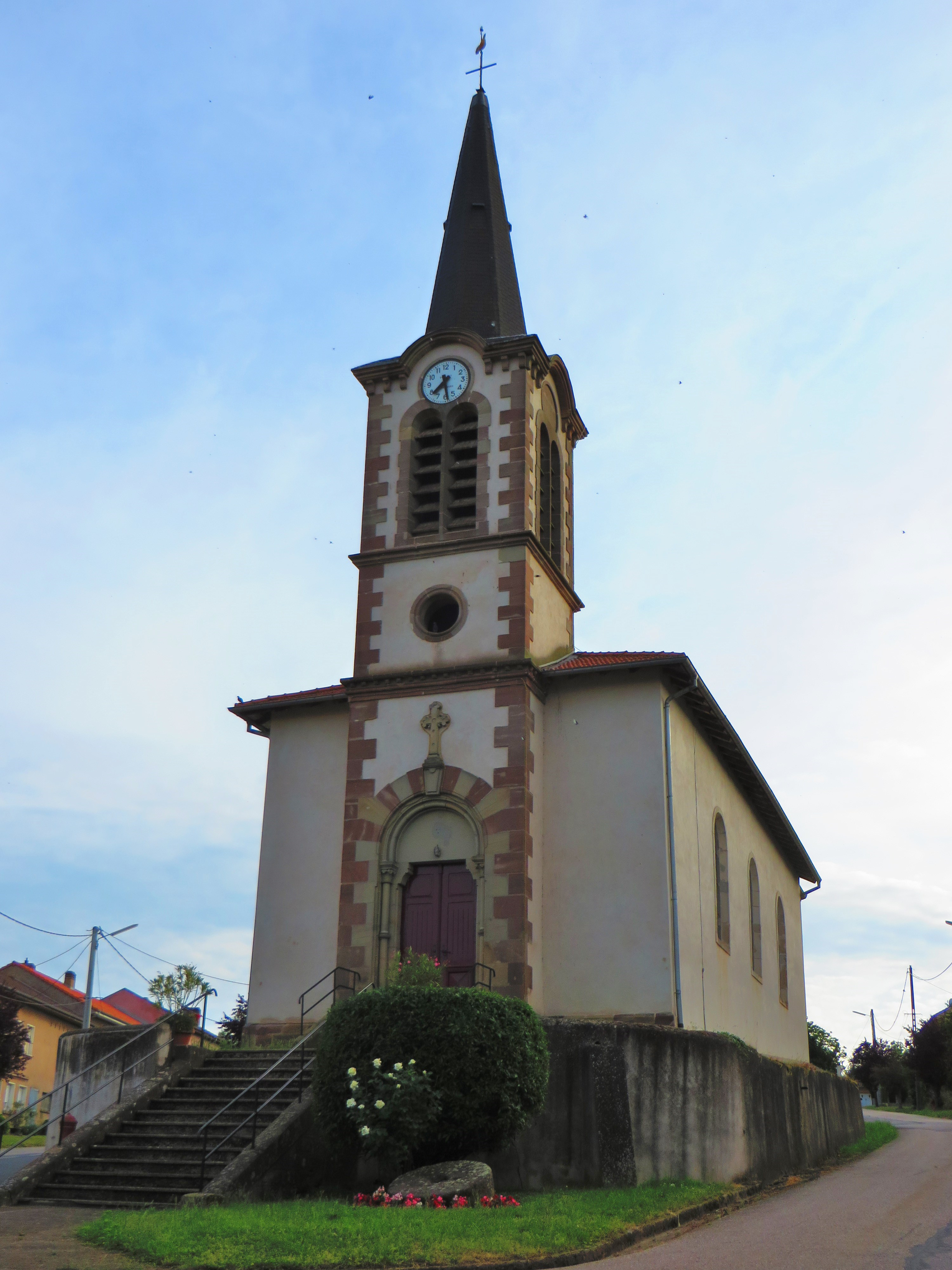 Xanrey eglise